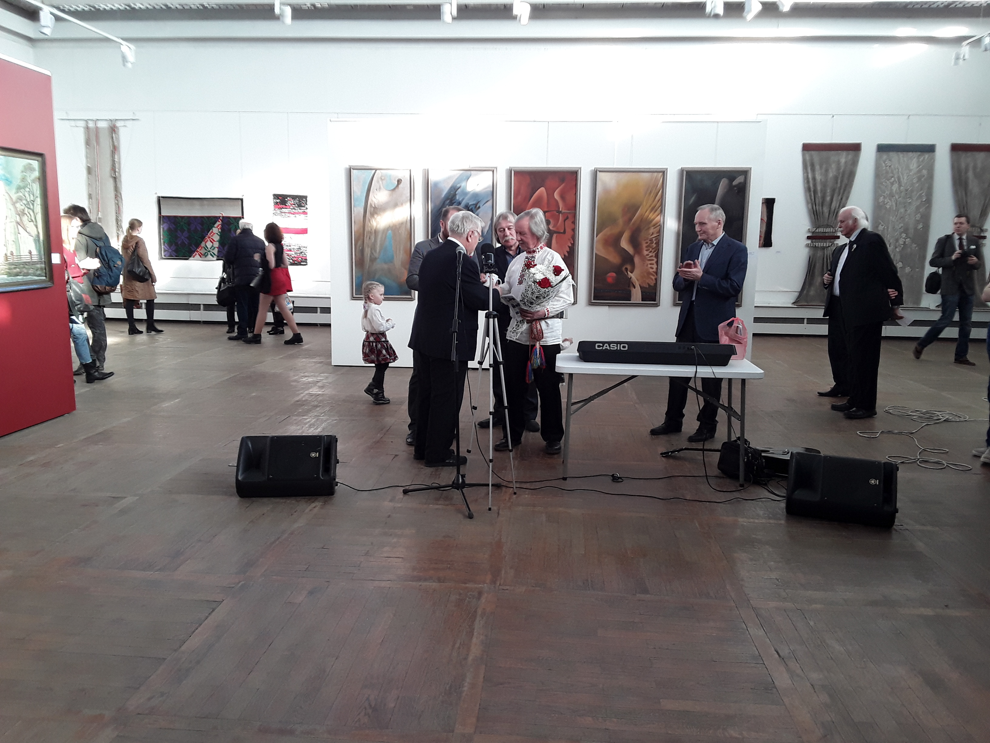 На адкрыцці выставы. 2018 г.